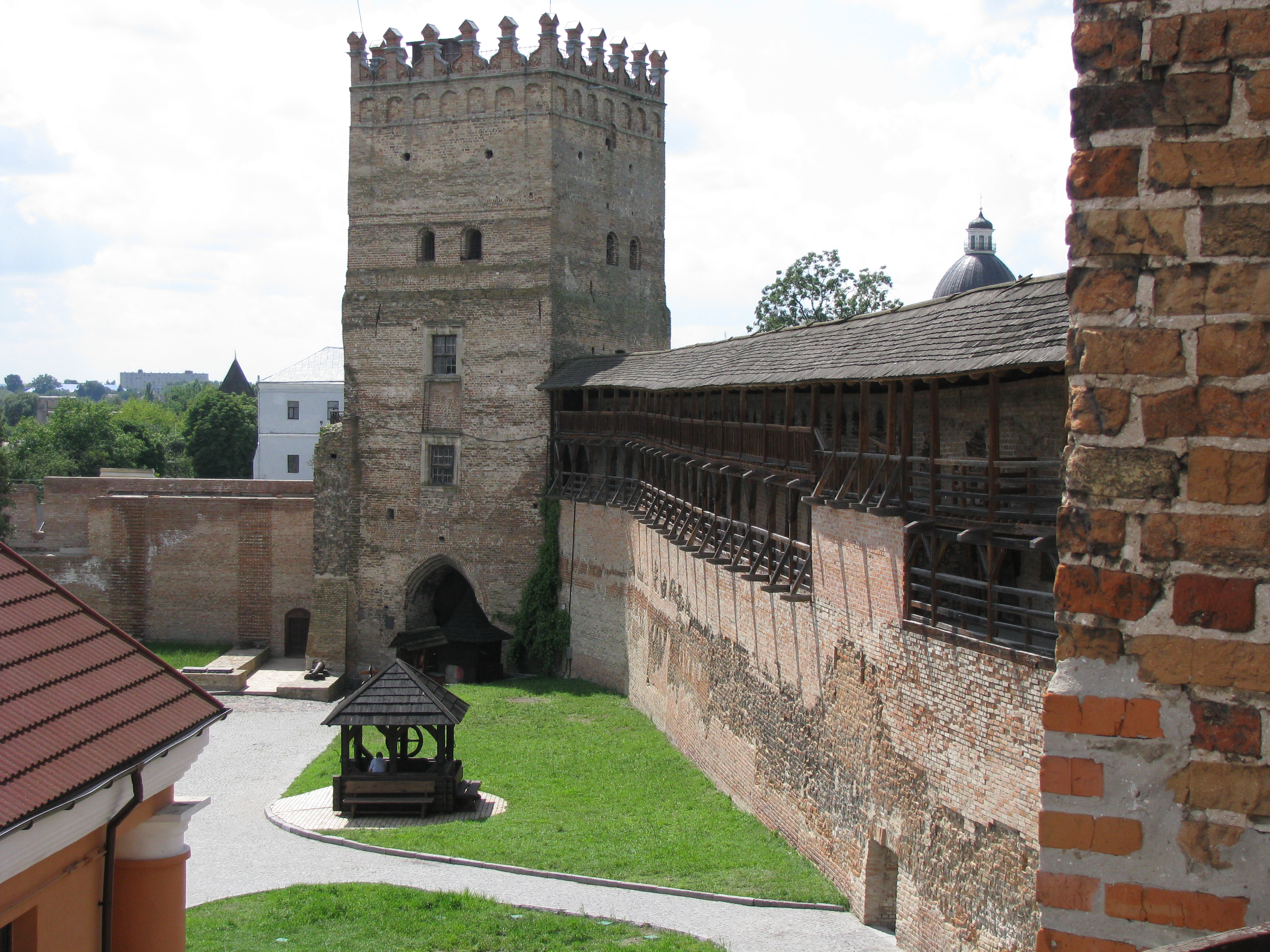 Рихлюк Сергій